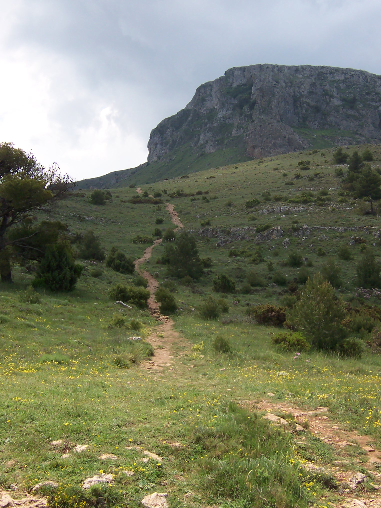 Senda hacia el Montcabrer en el camino subiendo a la cima desde la Font de la Mariola. Autor: José Fco. Català Senent